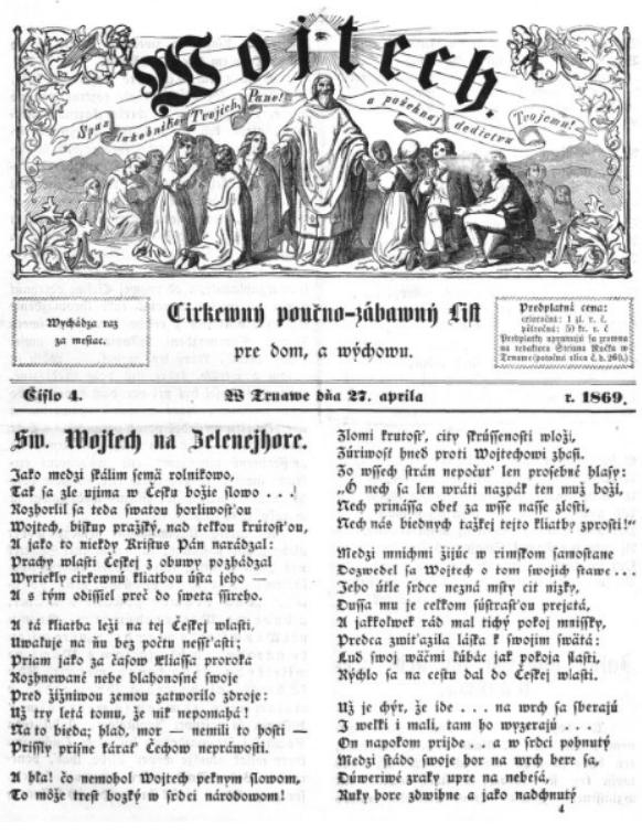 Titulný list časopisu Wojtech, ktorý vychádzal v Trnave v rokoch 1866 - 1869